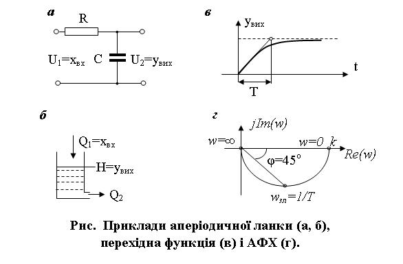 Аперіодична_ланка: Рисунок